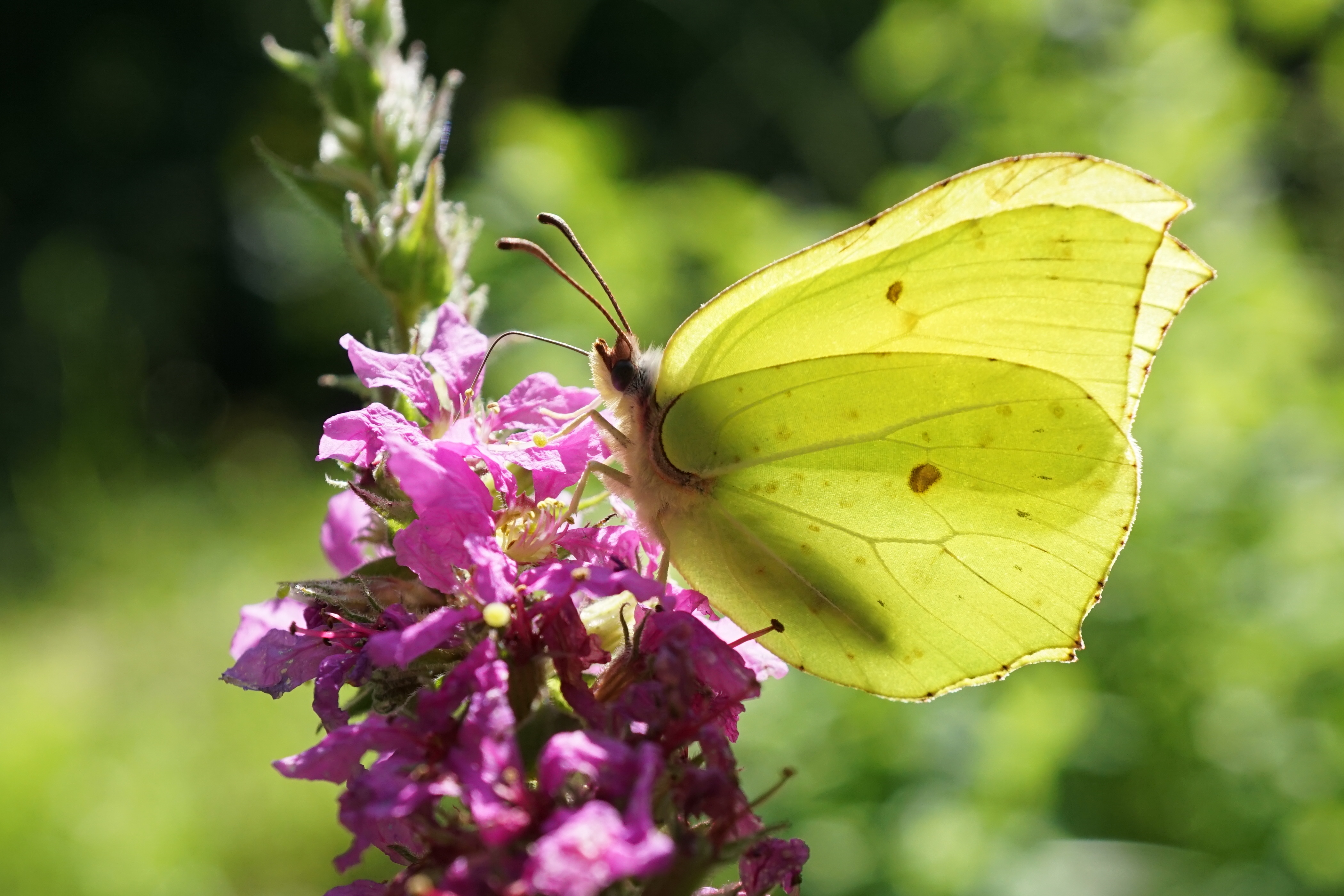 common brimstone Zitronenfalter